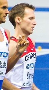 Nathan Brannen, Berlin 2009